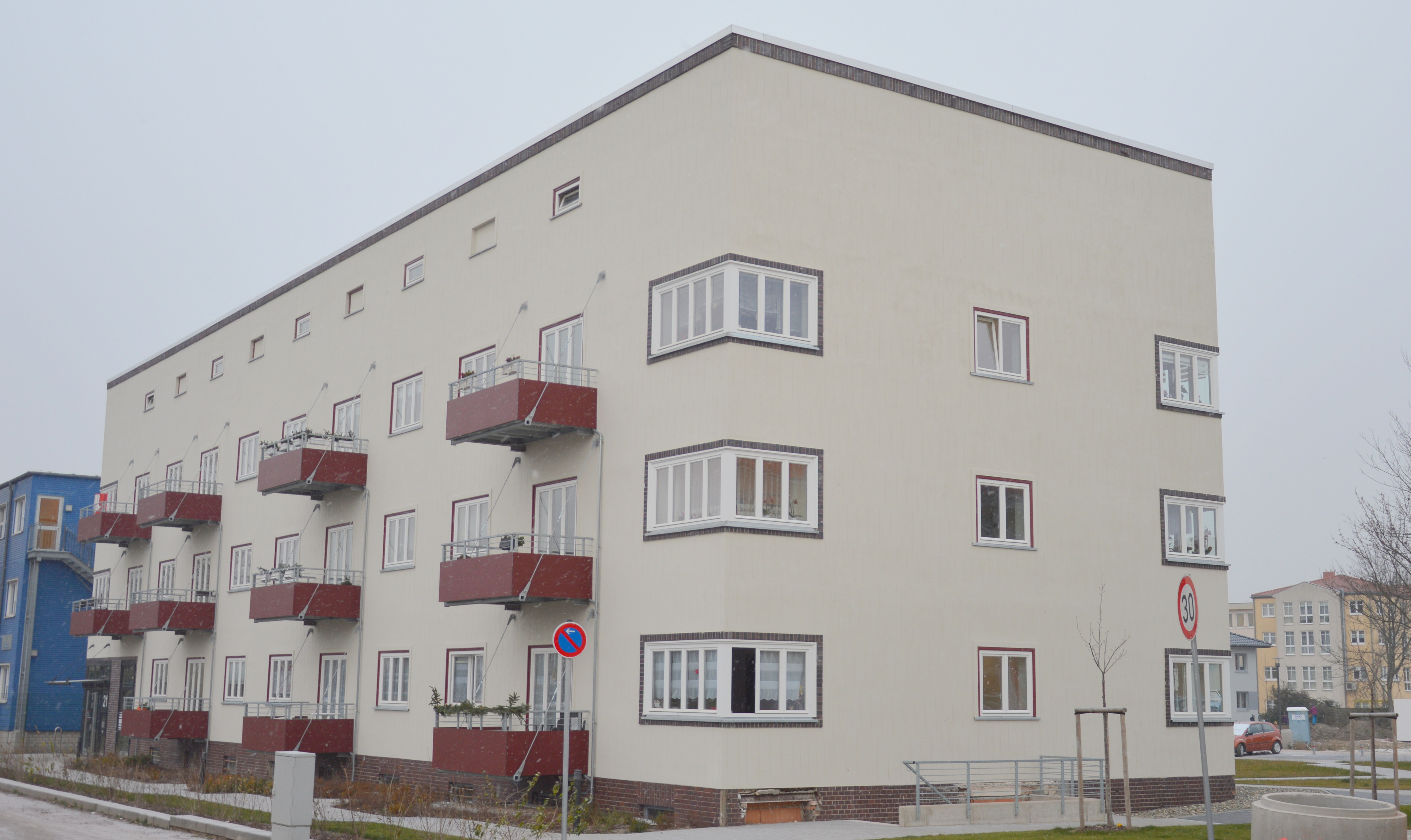 Haus Emanuel-Larisch-Weg 21 in Magdeburg